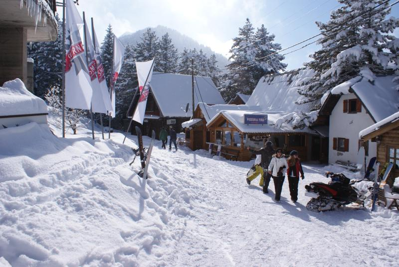 Brezovica 6 March 2010